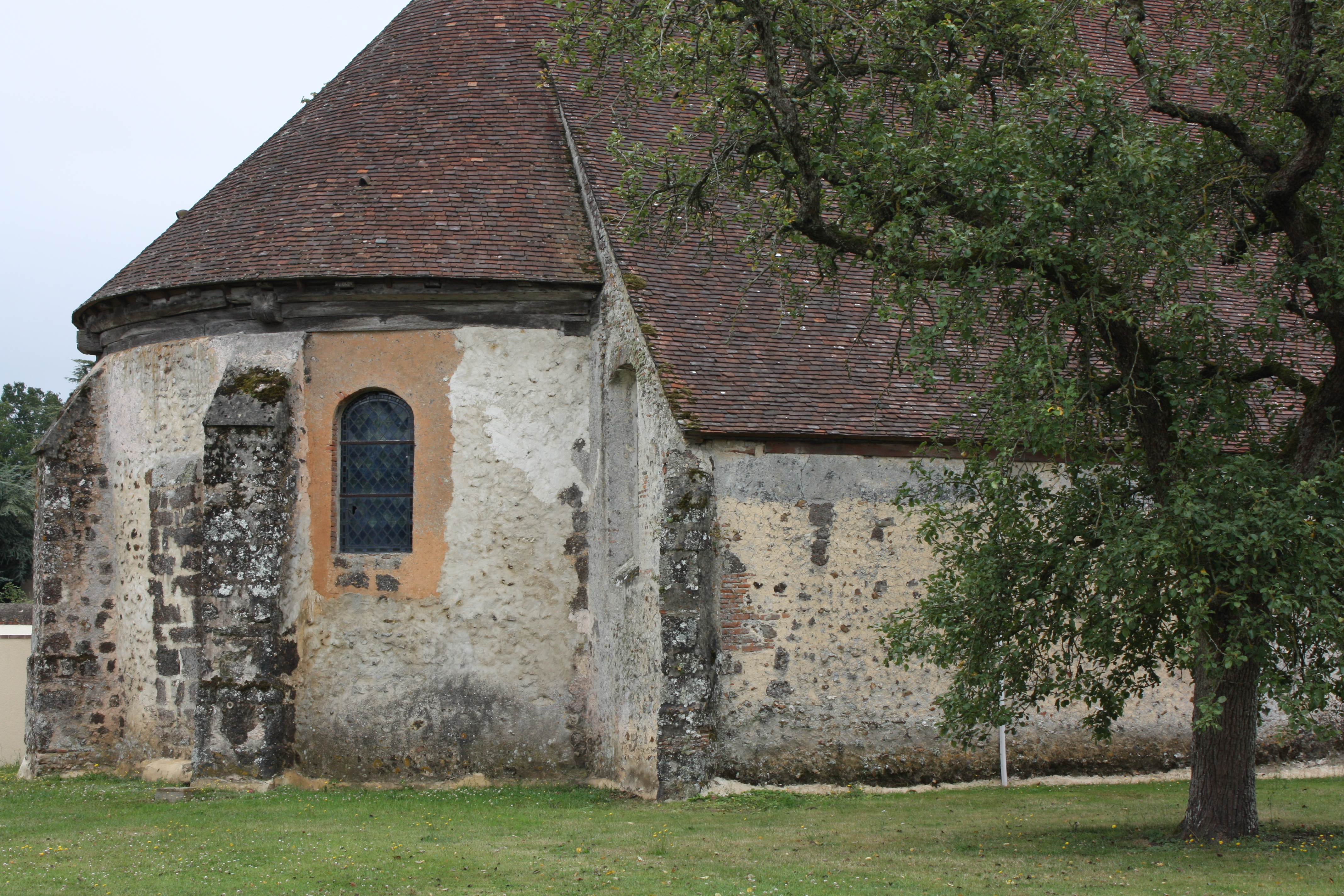 La Saucelle - Eglise Sainte-Anne Abside vue du Nord